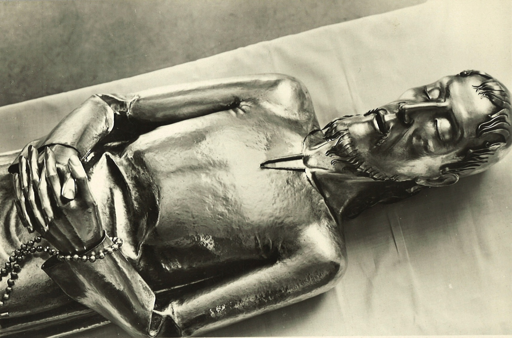 Lebensgrosses Reliquiar für die Gebeine des Heiligen Bruder Klaus in der Pfarrkirche von Sachseln/OW, Burch-Korrodi 1934